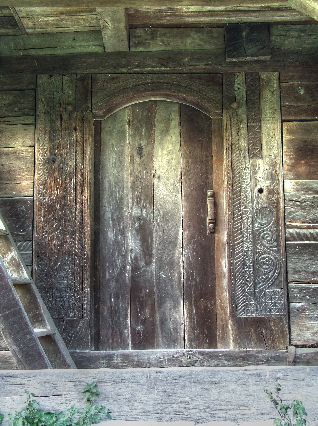 Biserica de lemn din Buzaş